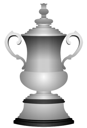 FA Cup